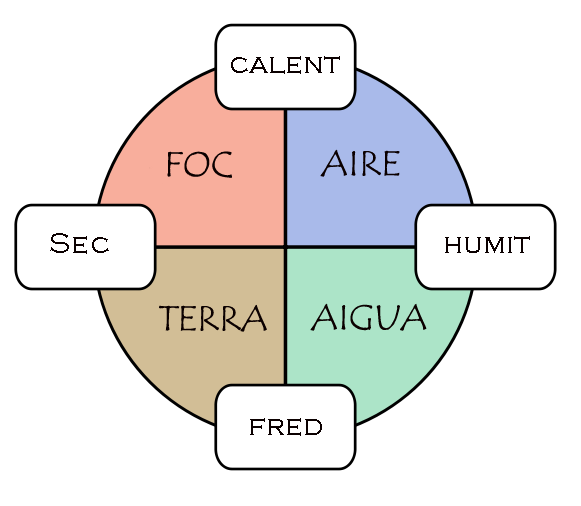 Aquest esquema representa les qualitats elementals que formen les combinacions dels quatre elements.